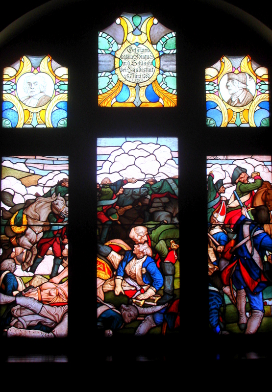 Kamienna Góra, witraż w sali rajców miejskich